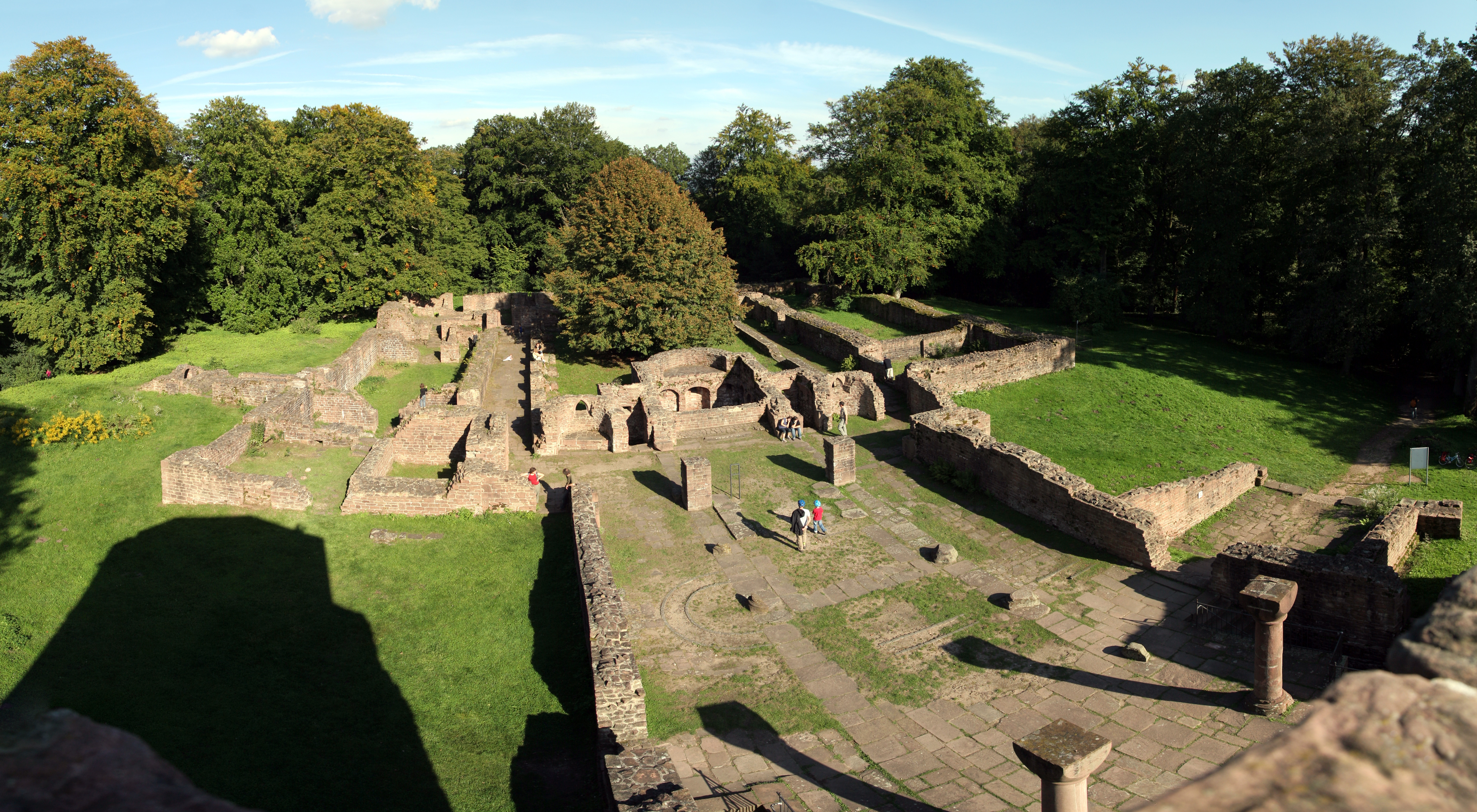 Das Michaelskloster auf dem Heidelberger Heiligenberg. Aus acht Einzelaufnahmen zusammengesetztes Panorama. Kamerastandort: Der Westturm des Klosters. Horizontaler Bildwinkel: ca. 140°